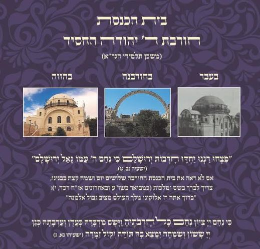 נוסח הברכה שמברכים על הבית הכנסת, בכריכת ספר